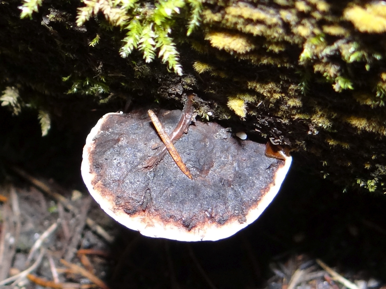 Fomitopsis rosea (location: Slovakia, Slovenský raj, Sokolia dolina)